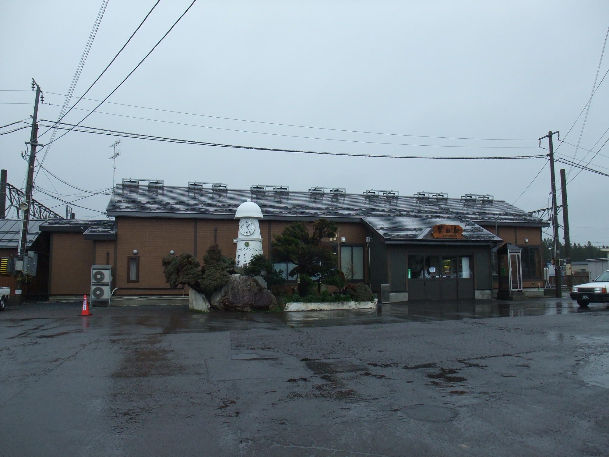 蟹田駅(2012/05/04)